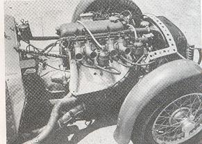 Bandini 1500 sport siluro